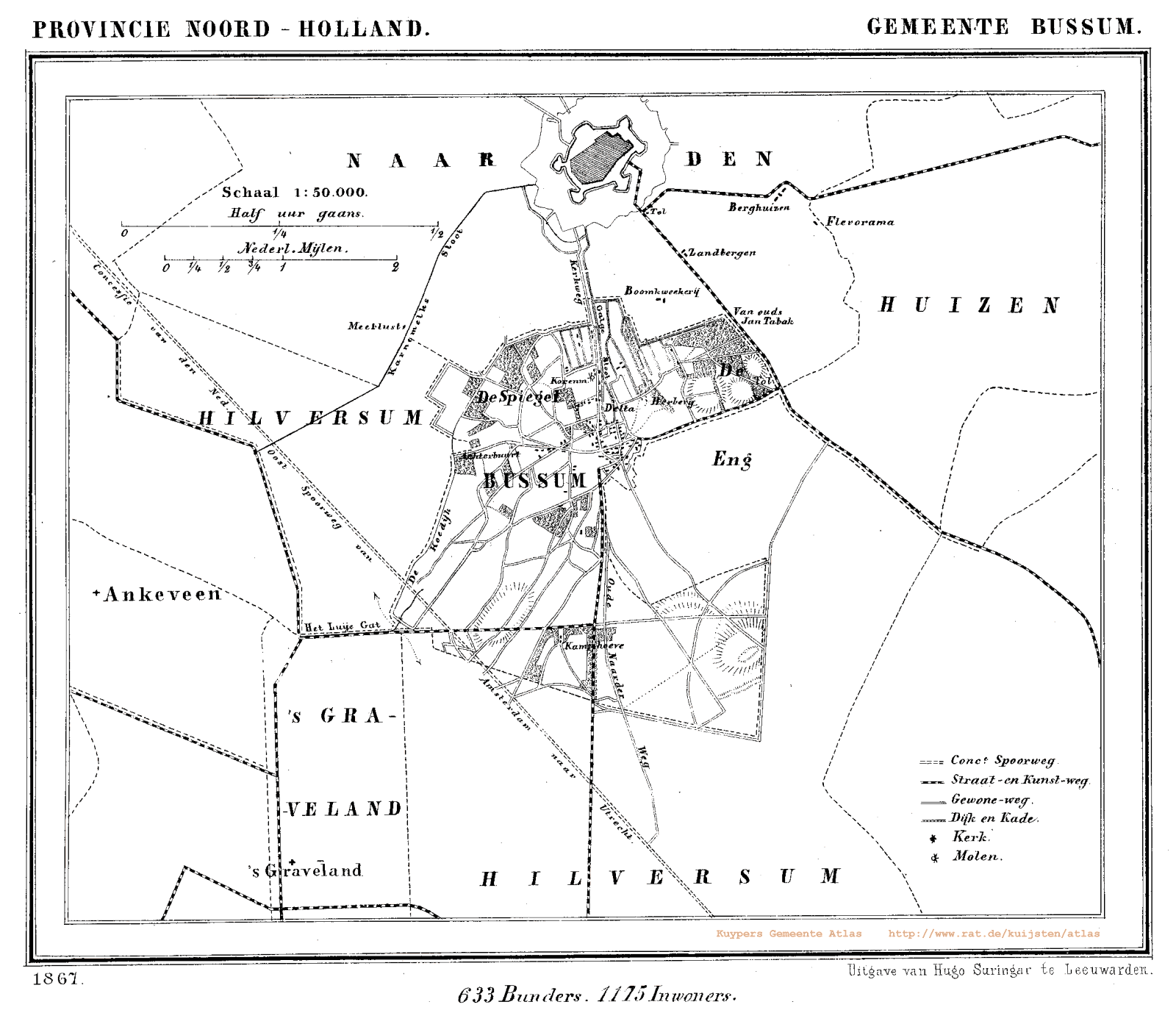 Kaart van Bussum uit Gemeente Atlas van Nederland, J. Kuyper 1865-1870, Uitgave Hugo Suringar Leeuwarden.